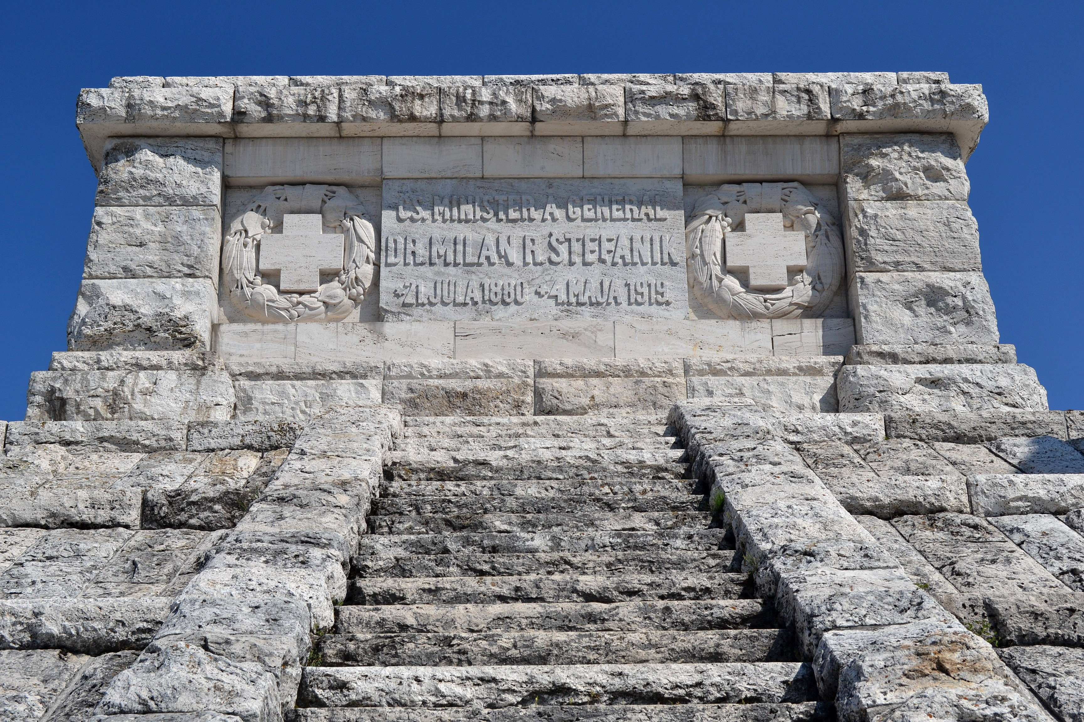 Nápis na tumbe - južná strana